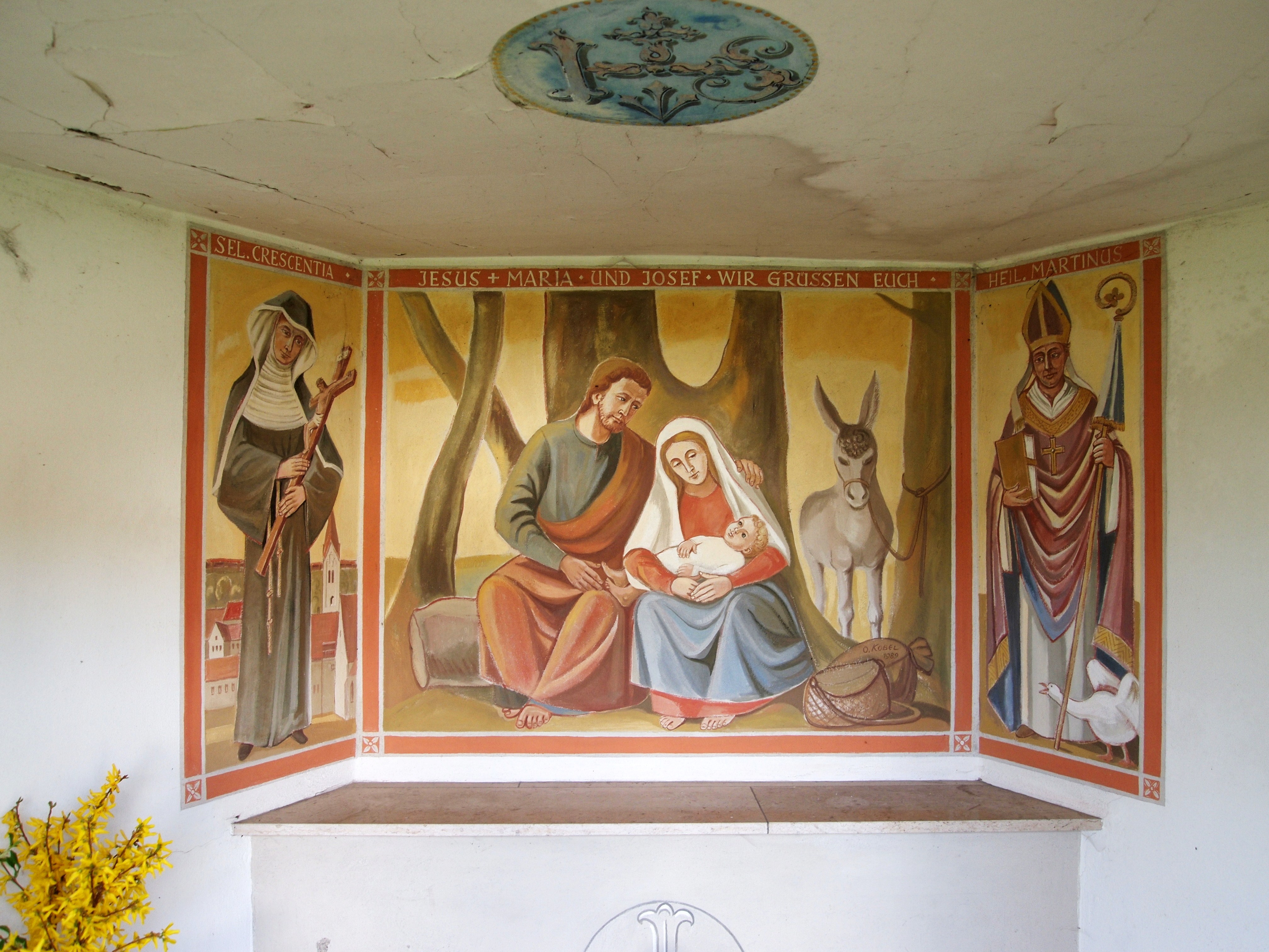 Kaufbeuren, OT Großkemnat, Wegkapelle Fresko Hl. Crescentia, Heilige Familie, Hl. Martin von Otto Kobel, 1989